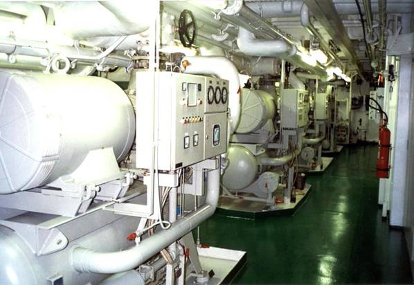 Blick in den Kühlmaschineraum